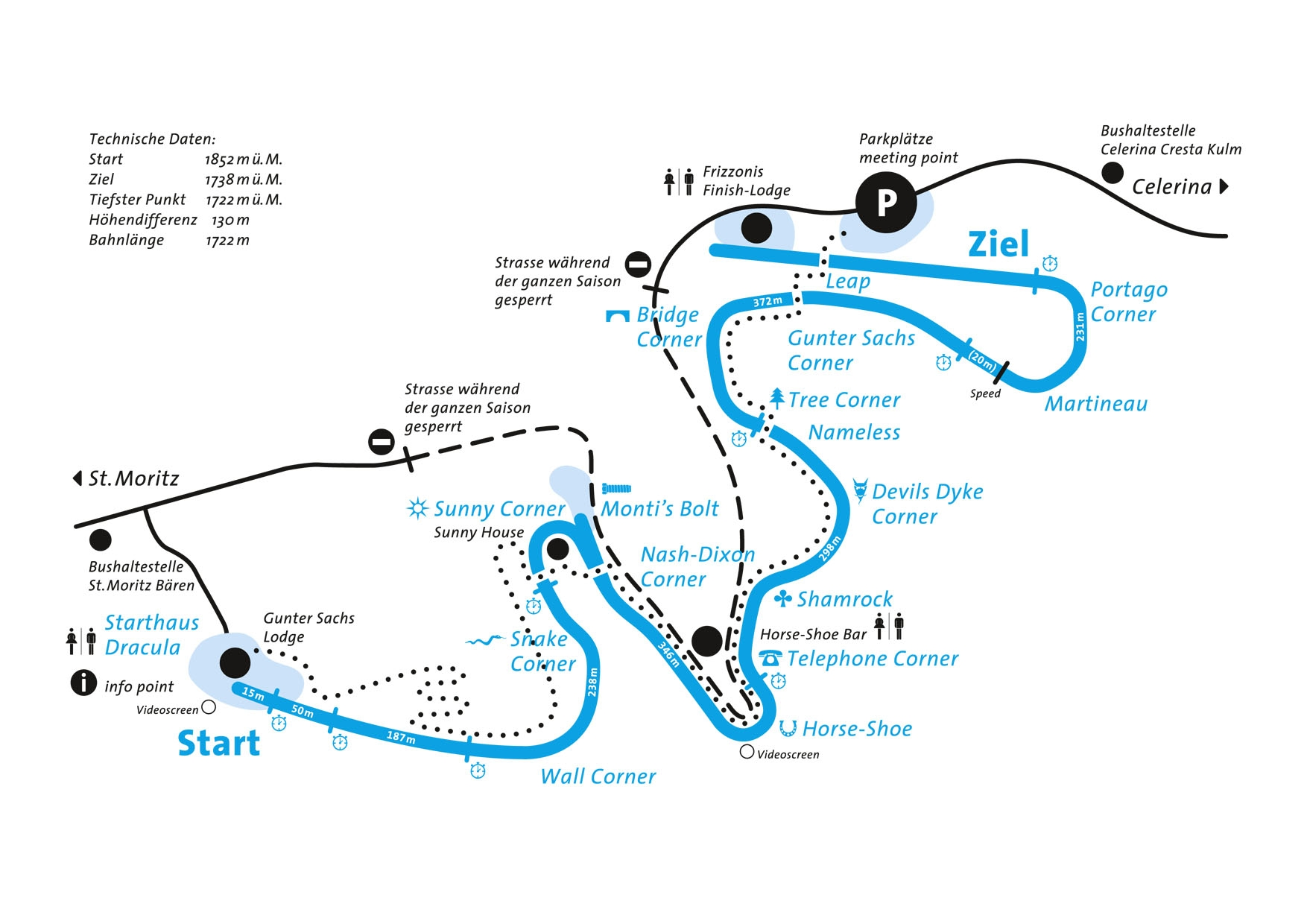 OBR Bob Run Plan